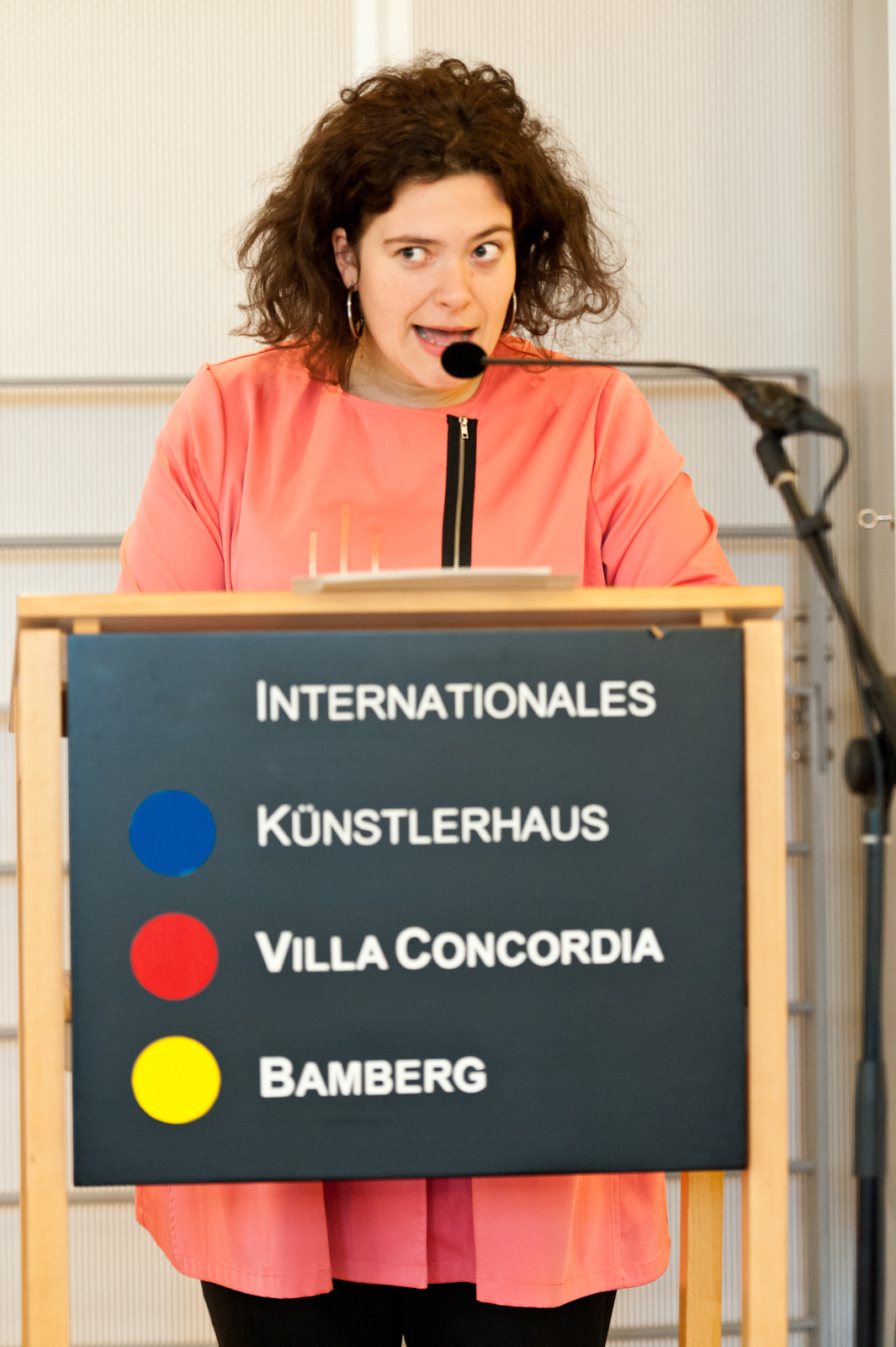 Die Direktorin des Internationalen Künstlerhauses, Nora-Eugenie Gomringer, im Jahr 2013.